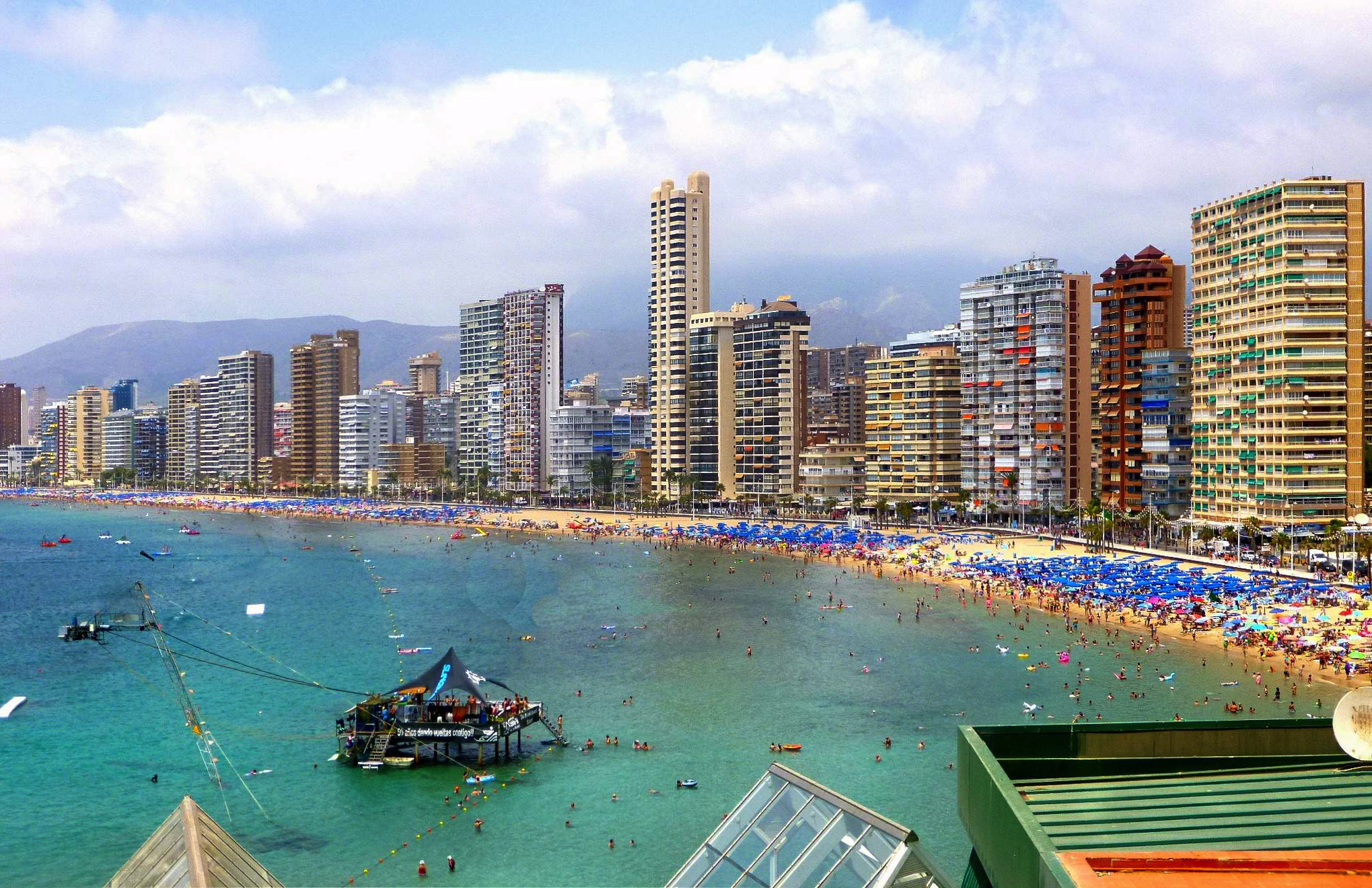 Playa de Poniente (Benidorm)